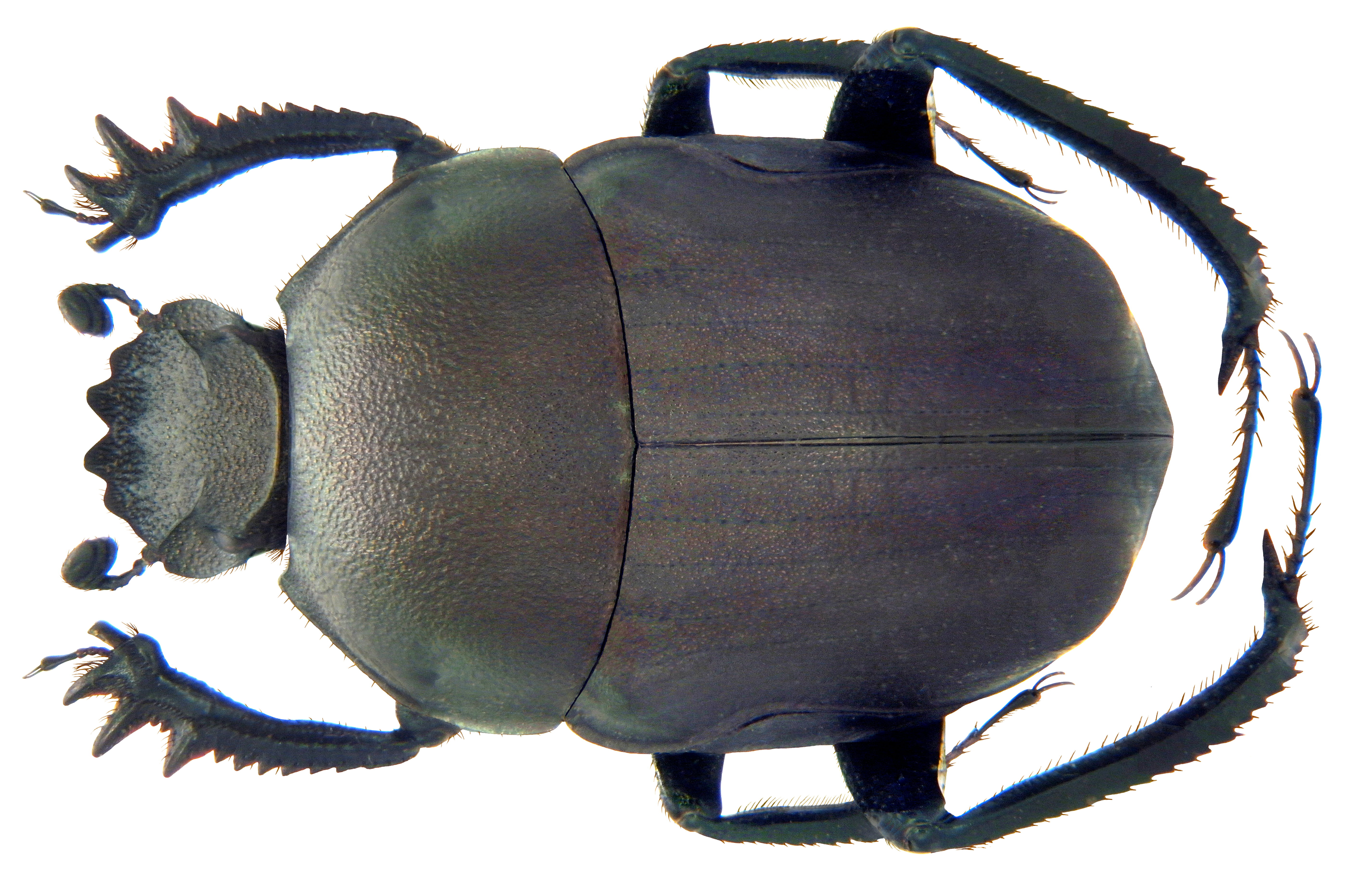 Familie: Scarabaeidae Groesse: 17 mm Fundort: Nepal, Dailek, 1250 m leg. W.Schawaller, 1998; det. J.Scheuern, 1999 Photo: U.Schmidt, 2010